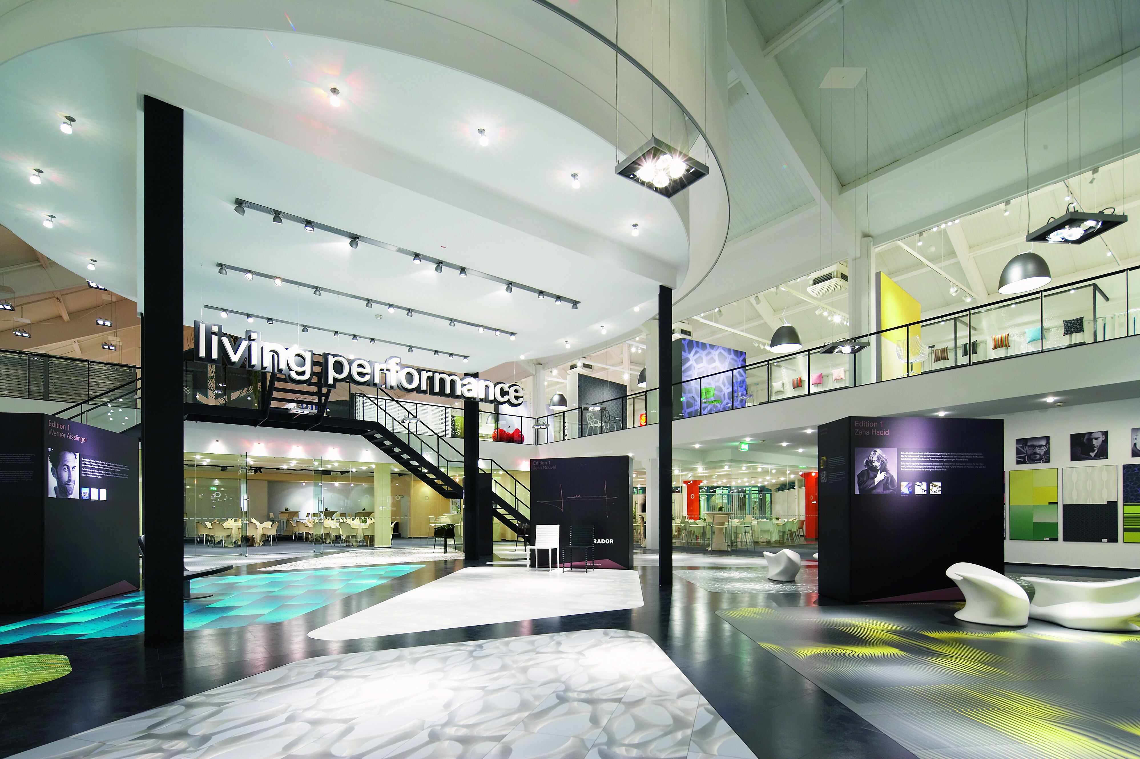 Das Parador Trendcenter in Coesfeld, NRW